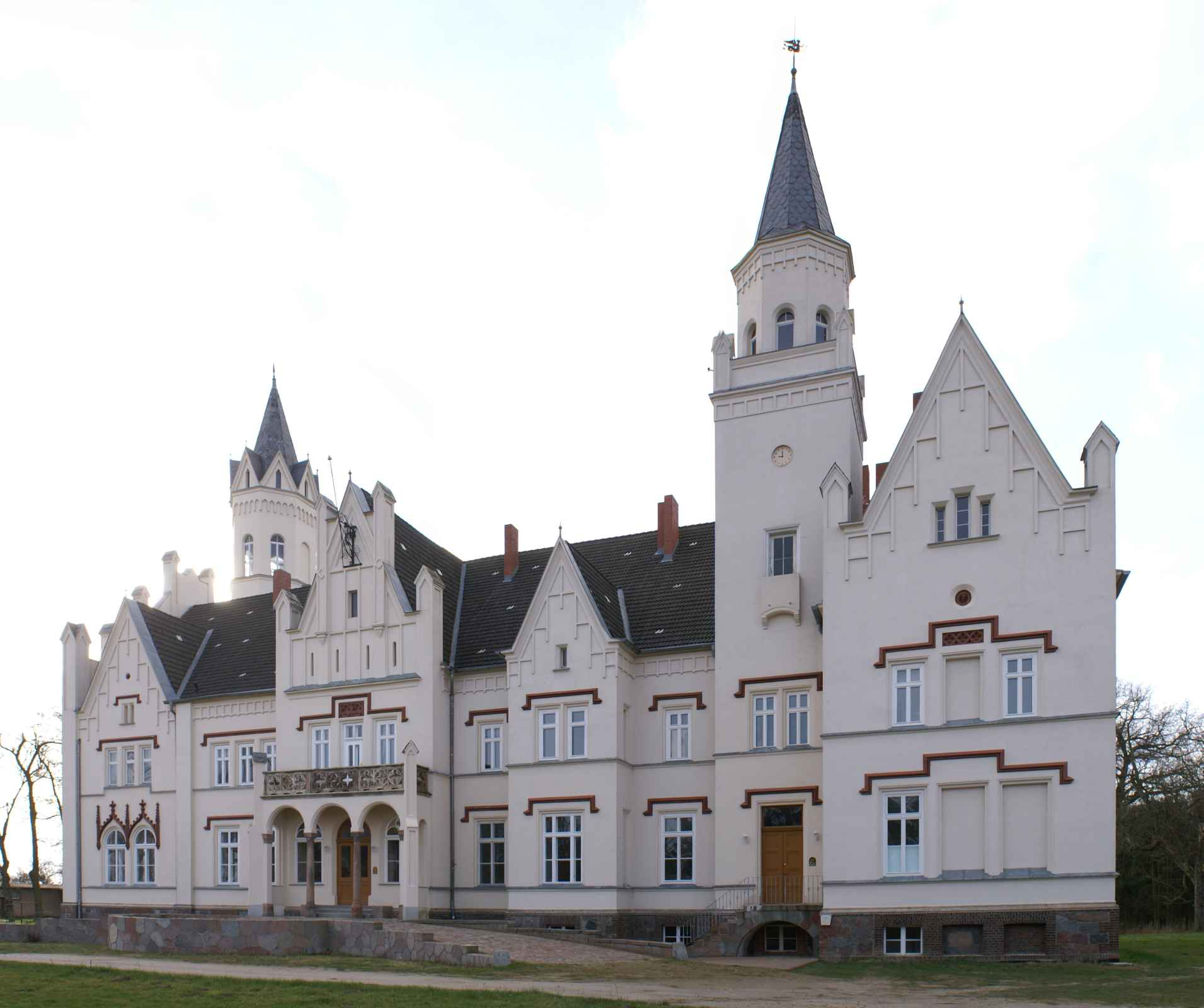 Kartlow (Landkreis Demmin) Schloss Ostseite